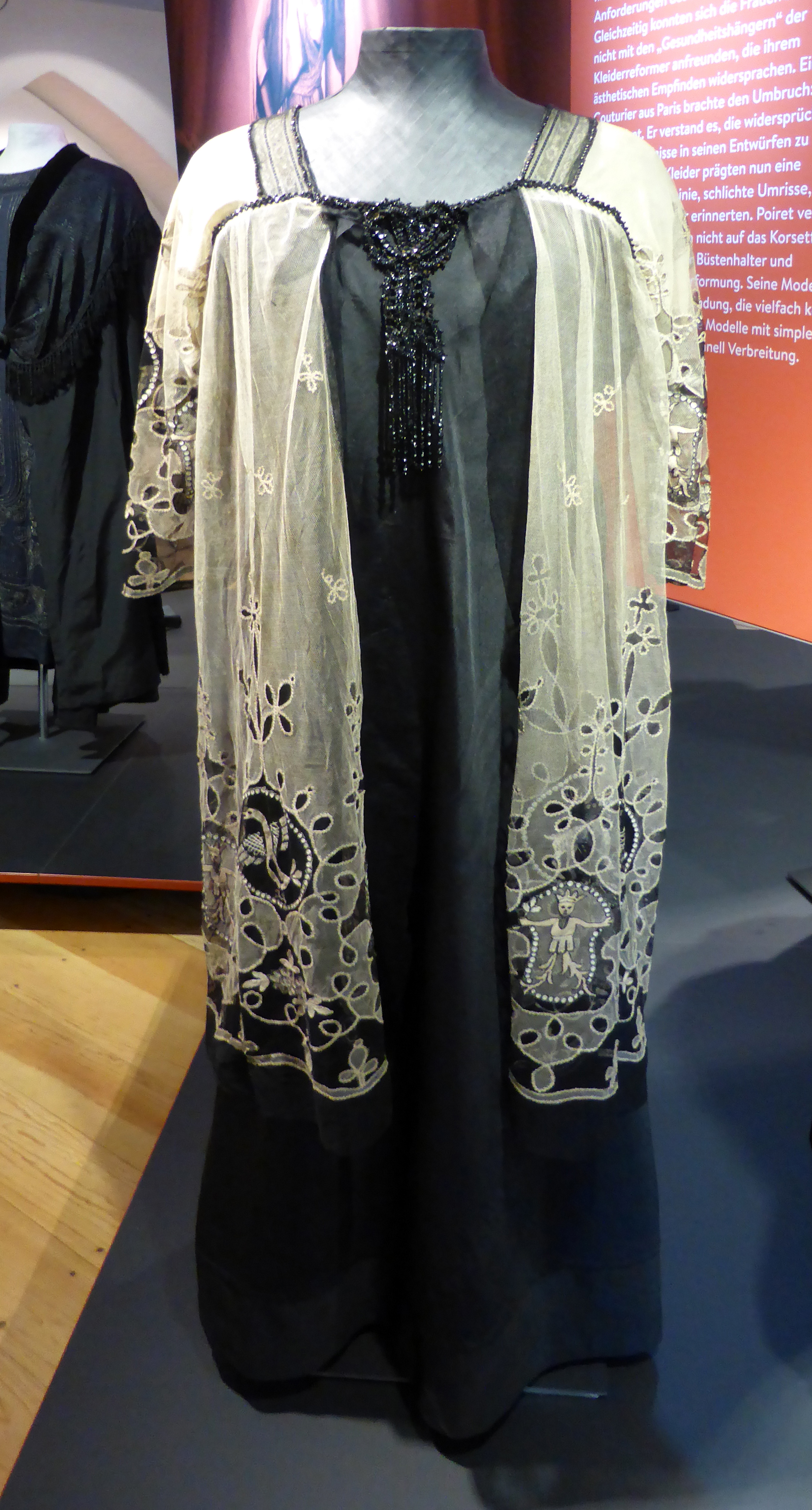 Sonderausstellung: Macht der Mode. Reformkleid mit hellem, besticktem Tüll und Jetperlenbesatz um 1910 im Textilmuseum Cromford in Ratingen.